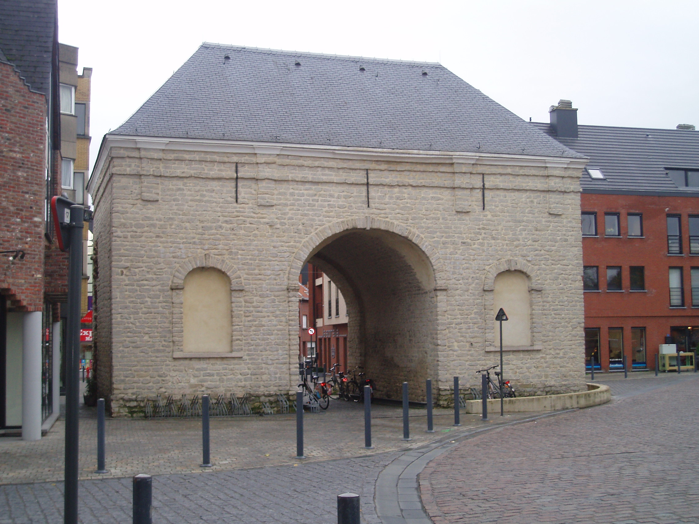 Zandpoort